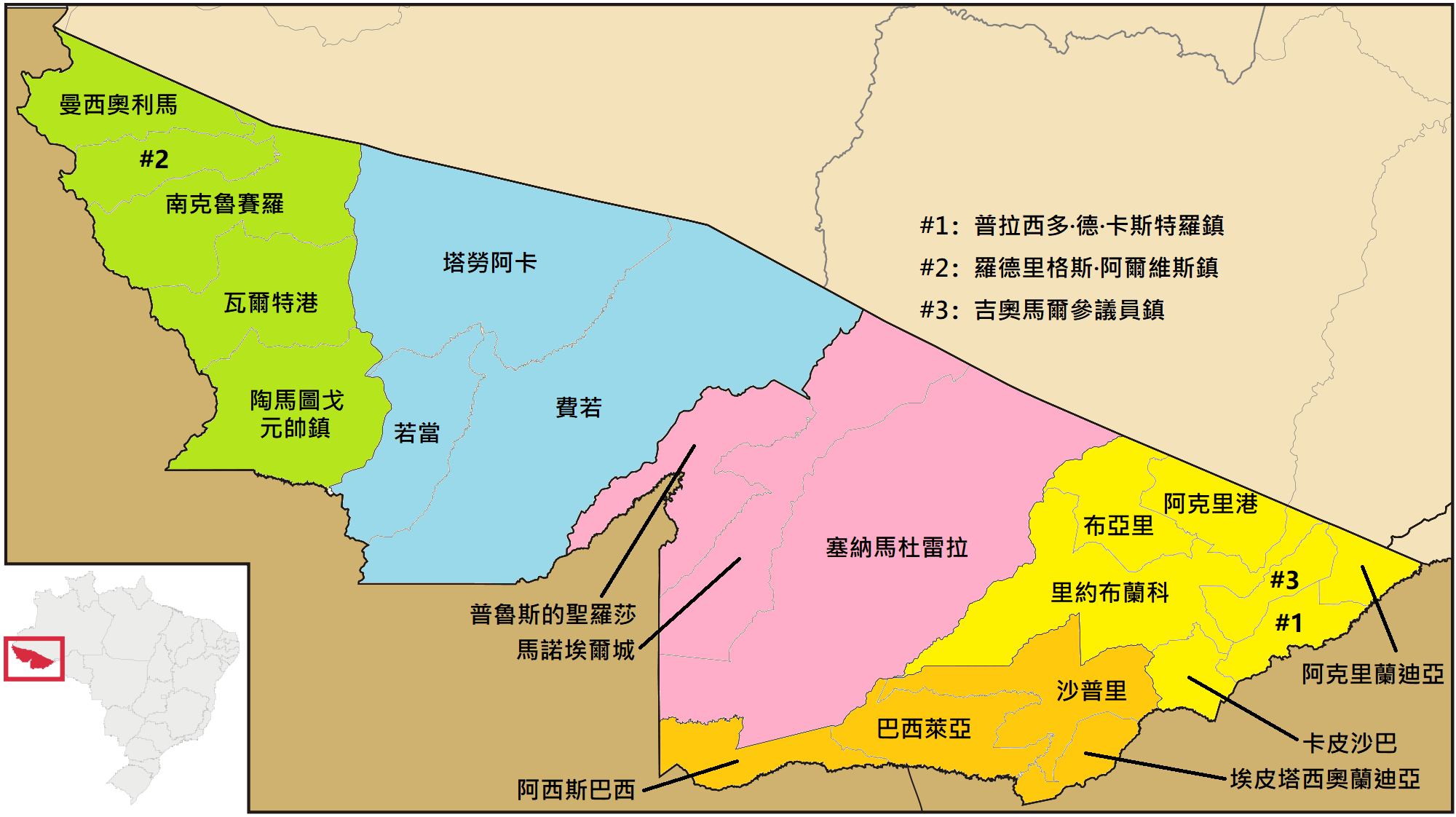 中文（香港）: 阿克里州市鎮列表。